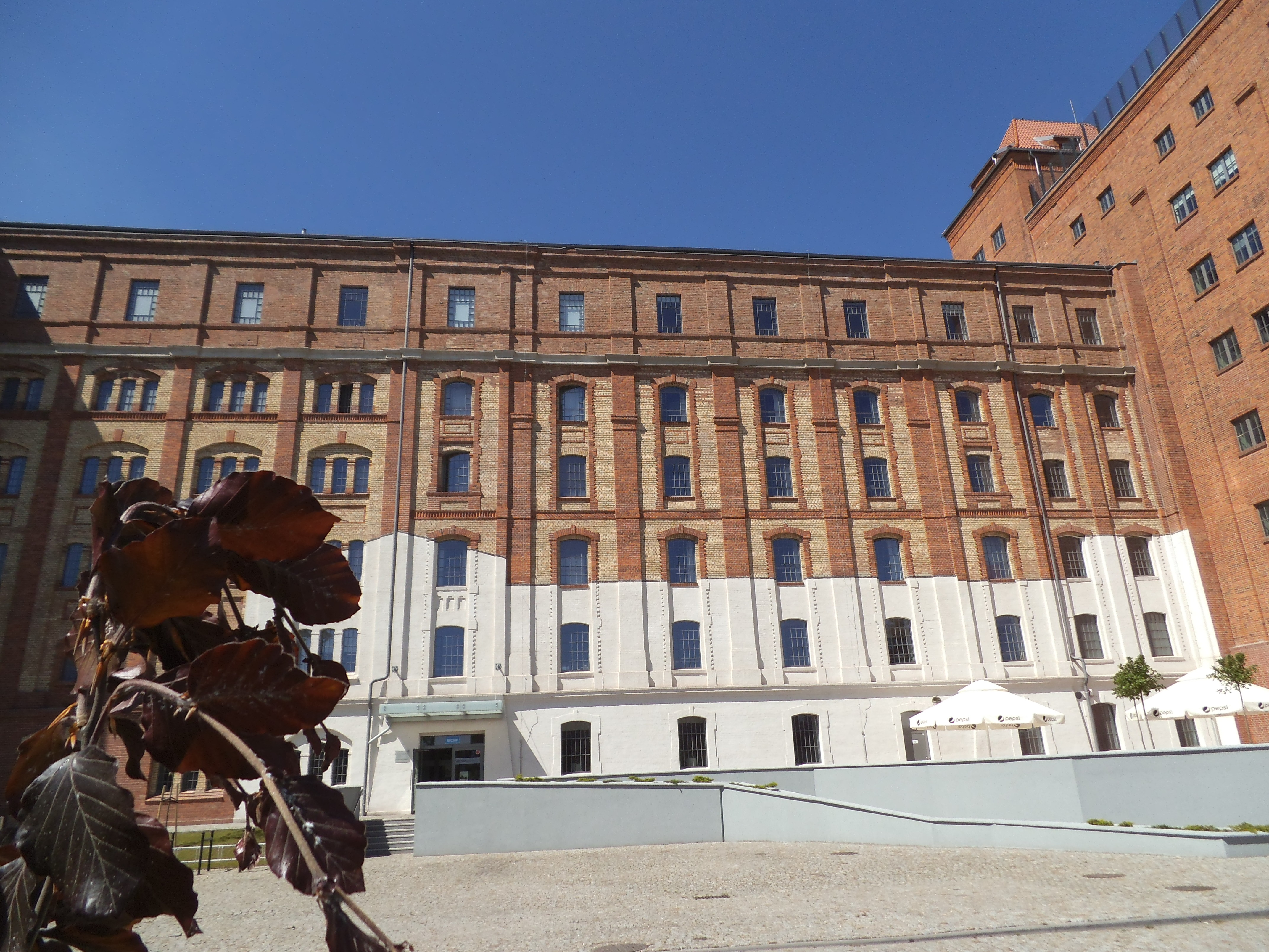 Międzynarodowe Centrum Spotkań Młodzieży w Toruniu